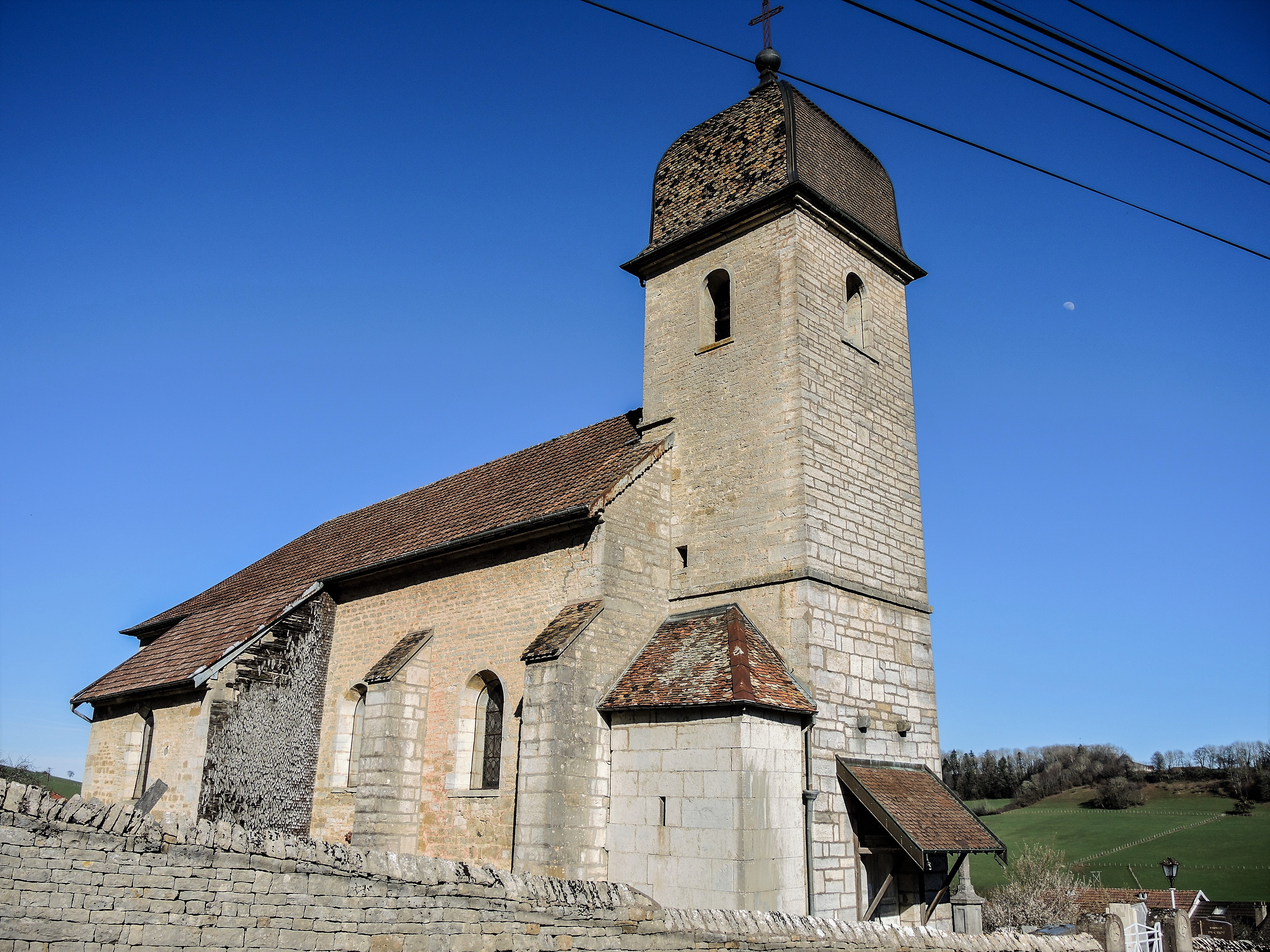 Eglise de Pugey.